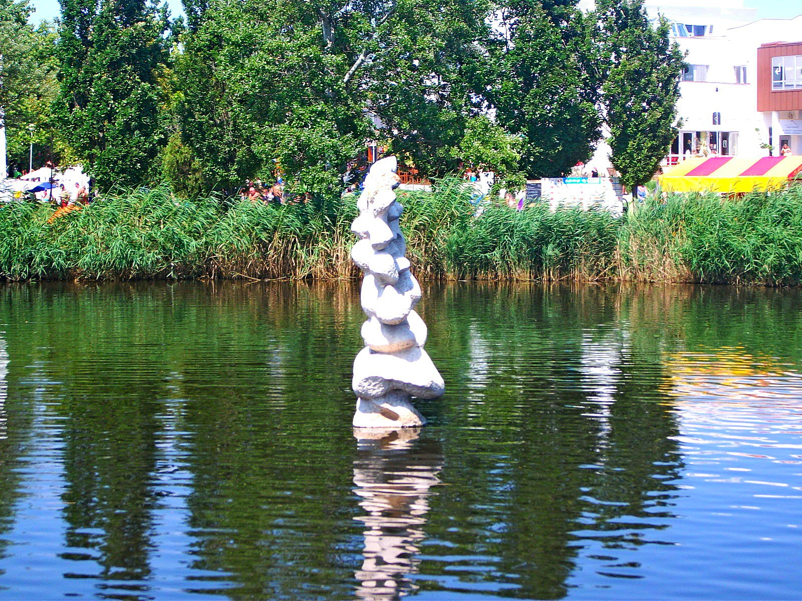 Napisten nevet viselő szobor a hajdúszoboszlói gyógyfürdő Csónakázó-tavának helyezkedik el. A szobor Szabó László 1972-ben felállított alkotása.